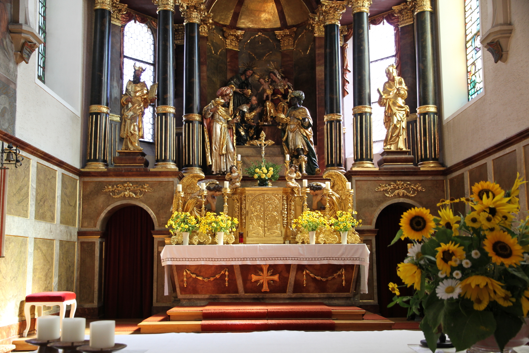 Der Tabernakel der Stadtpfarrkirche von Gmunden in Oberösterreich. Im Hintergrund die lebensgroße Gruppe "Anbetung der hl. drei Könige" von Thomas Schwanthaler und die Seitenfiguren Zacharias und Elisabeth vom Bildhauer Miachael Zürn d.J.